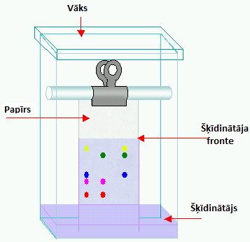 Papīra hromatogrāfijas rezervuārs